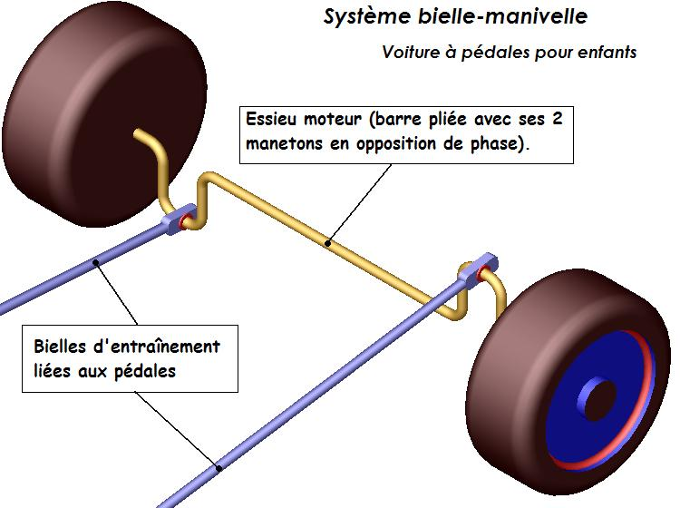 Système bielle manivelle dans une voiture à pédales. Transformation du mouvement de rotation alternative des pédales en rotation continue des roues. L'inertie de la voiture (+enfant) permet de passer les points morts (bout de course des pédales) copie d'écran SolidWorks. commentaires sous MS Paint.